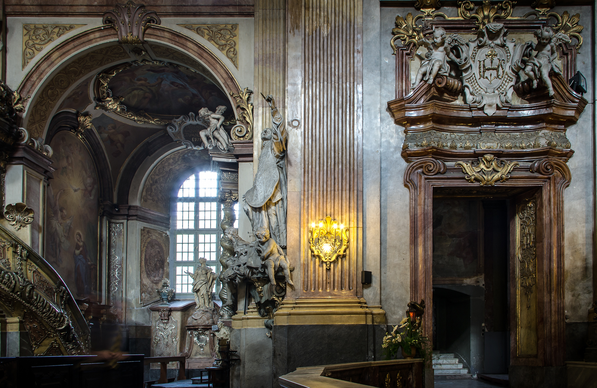 Kościół parafialny Najświętszego Imienia Jezus (Uniwersytecki) oo. jezuitów - wnętrze